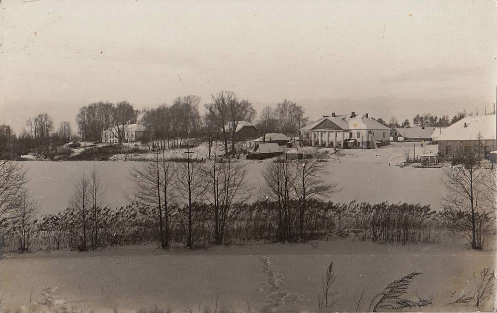 Беларуская (тарашкевіца): Відзы Лаўчынскія (Vidzy Łaŭčynskija)